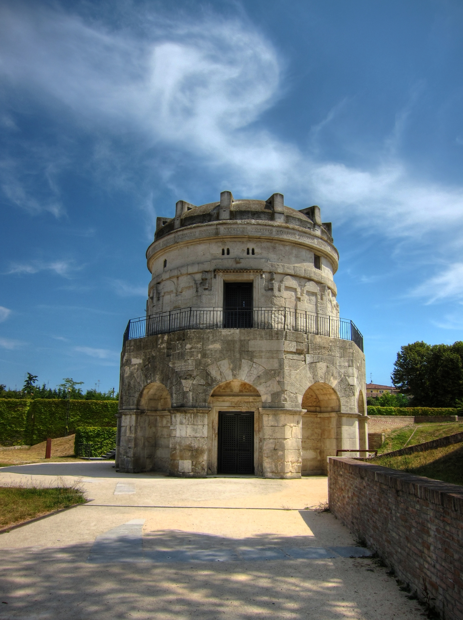 Mausoleo di Teodorico This is a photo of a monument which is part of cultural heritage of Italy.